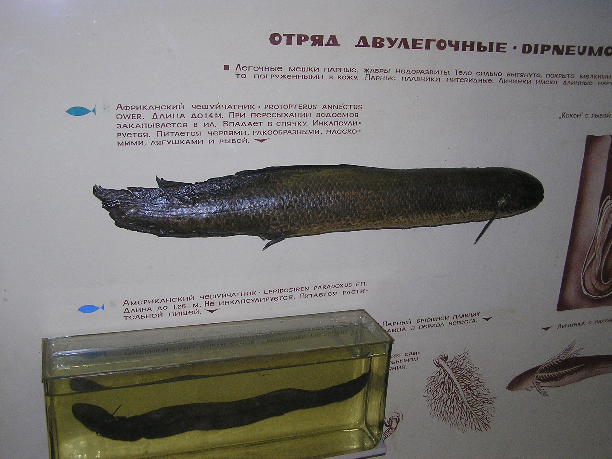 Зоологический музей в Санкт-Петербурге. Африканский чешуйчатник